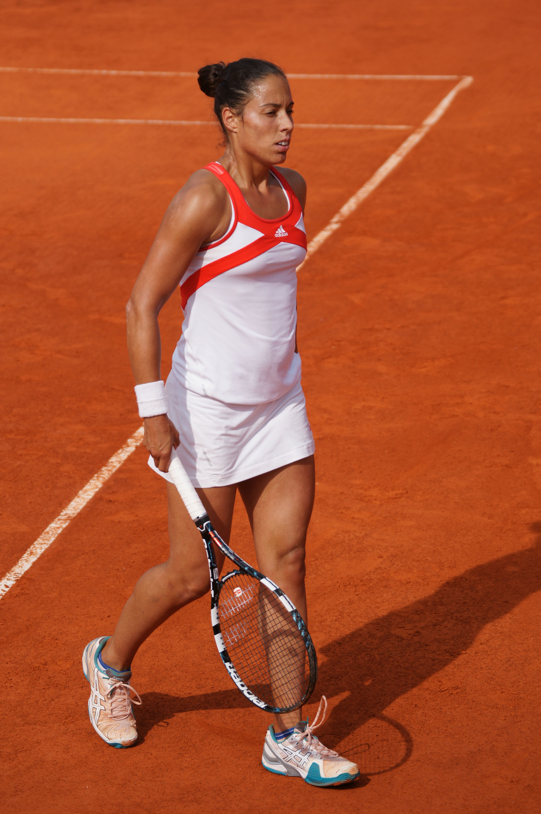 Estrella Cabeza Candela, Open ITF Cagnes 2013